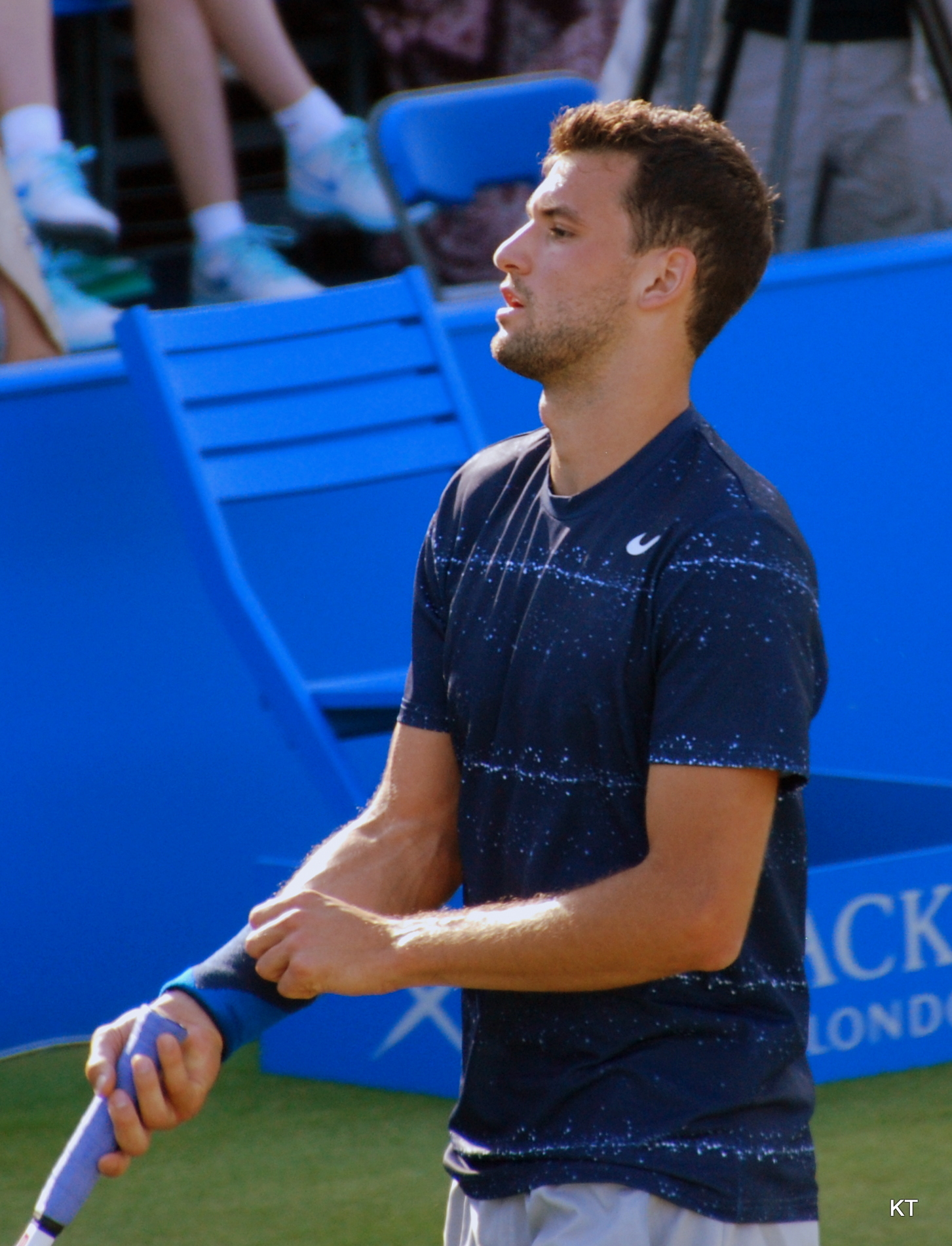 Grigor Dimitrov